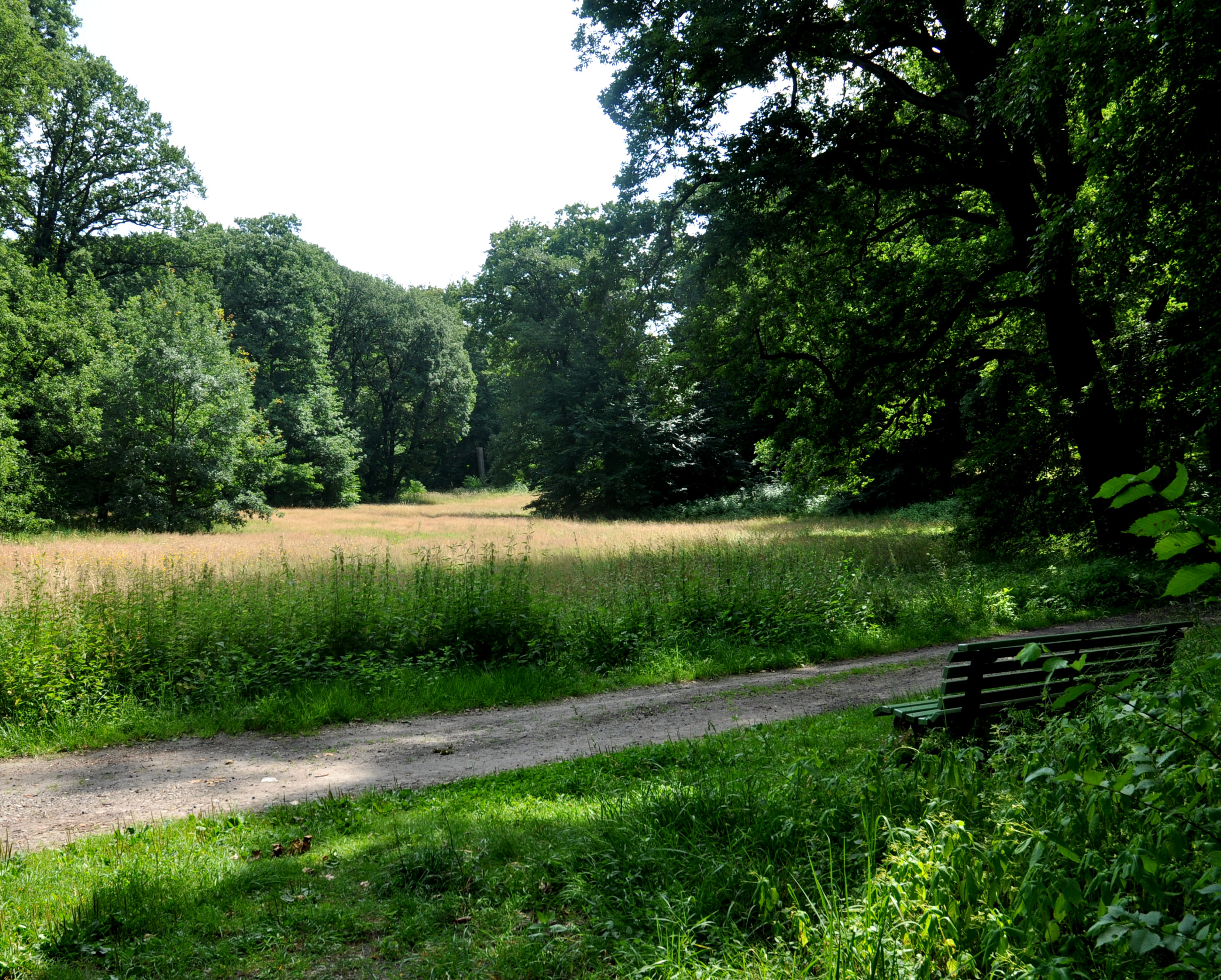 Der ehemals weite Parkraum am Jägerhof, in dem sich einst die Schießhütte befand